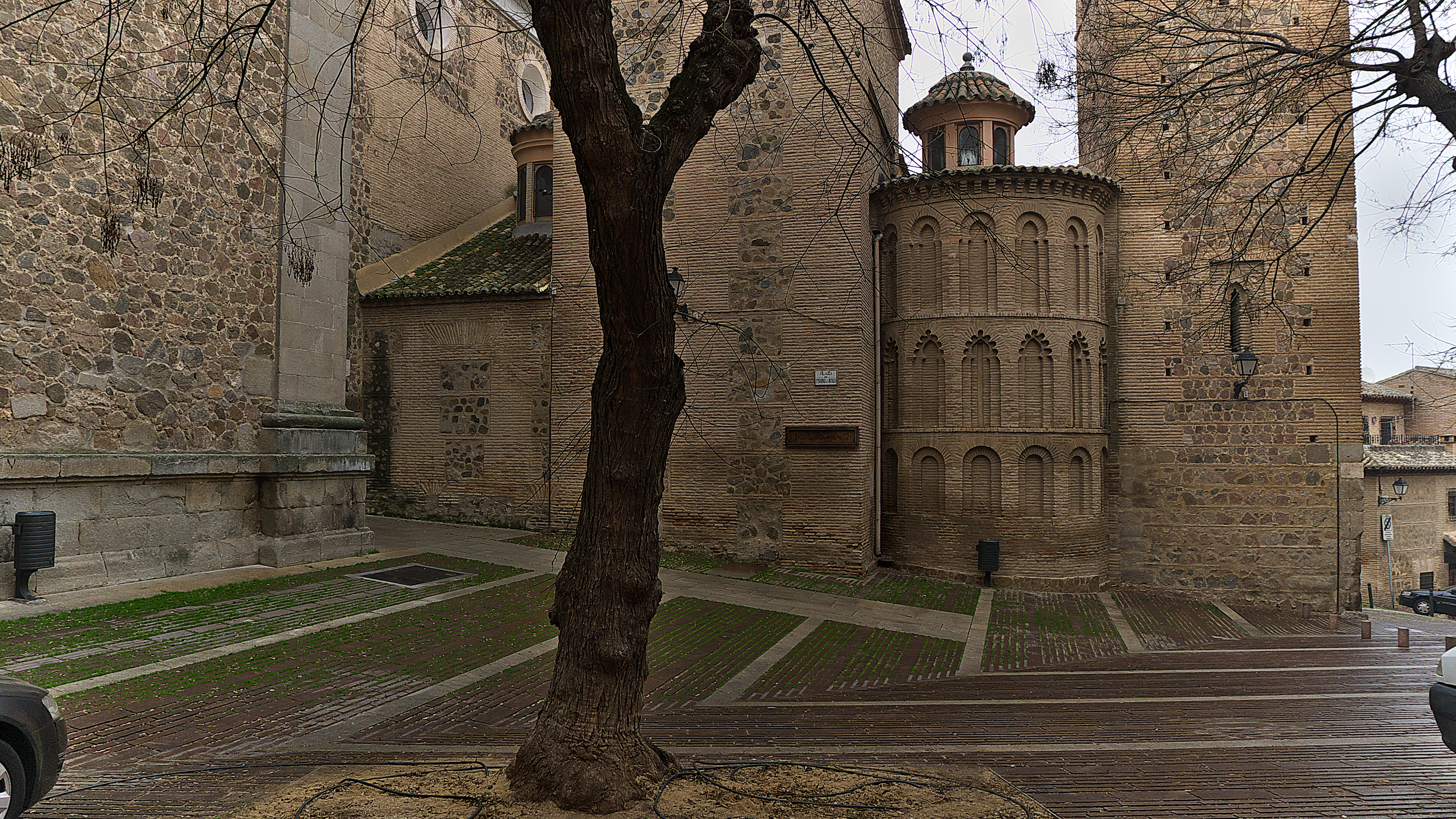 Exteriores del testero de la Iglesia de Santa Leocadia que conserva su fábrica mudéjar en la torre y en la cabecera de la nave del Evangelio.